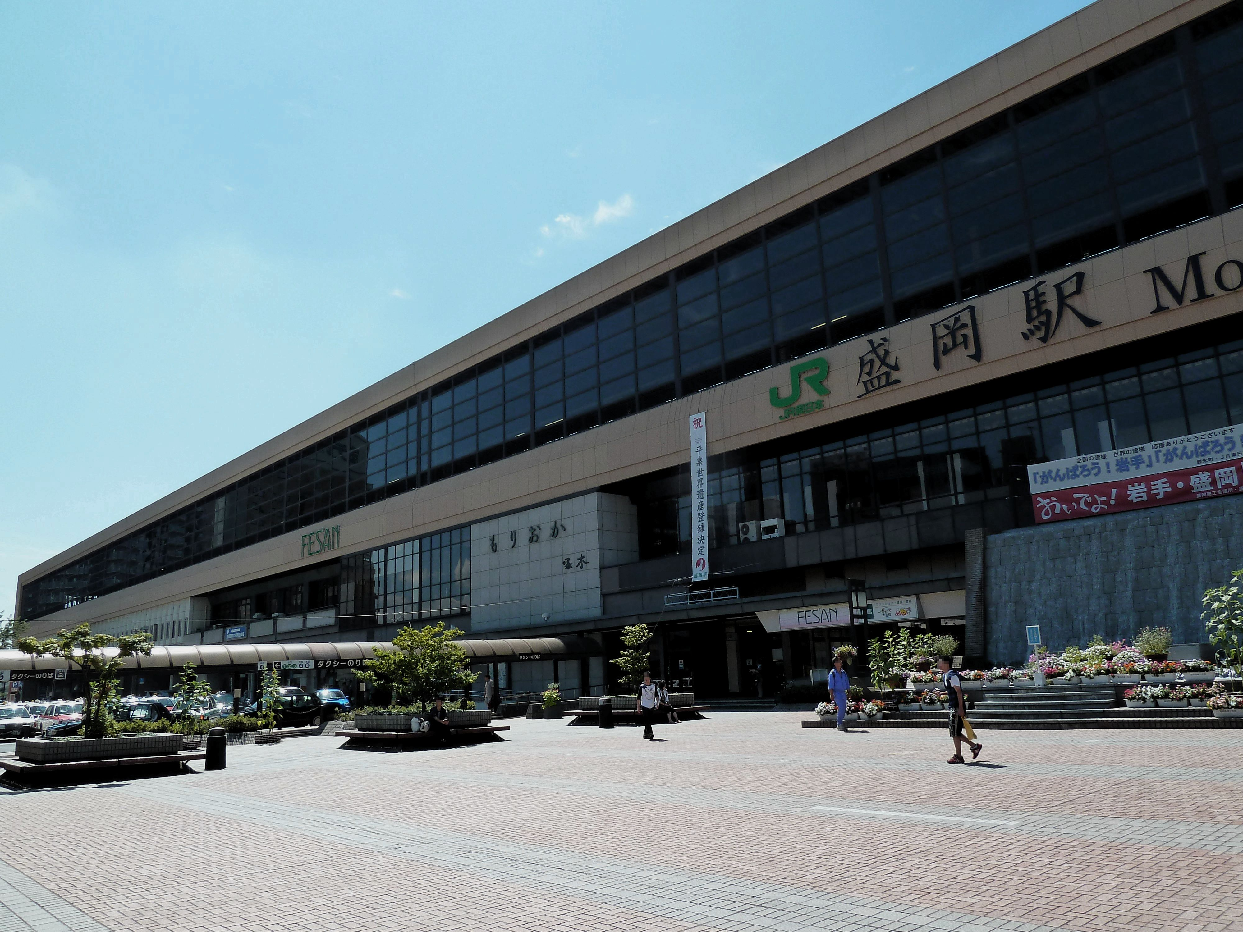 盛岡駅の駅舎